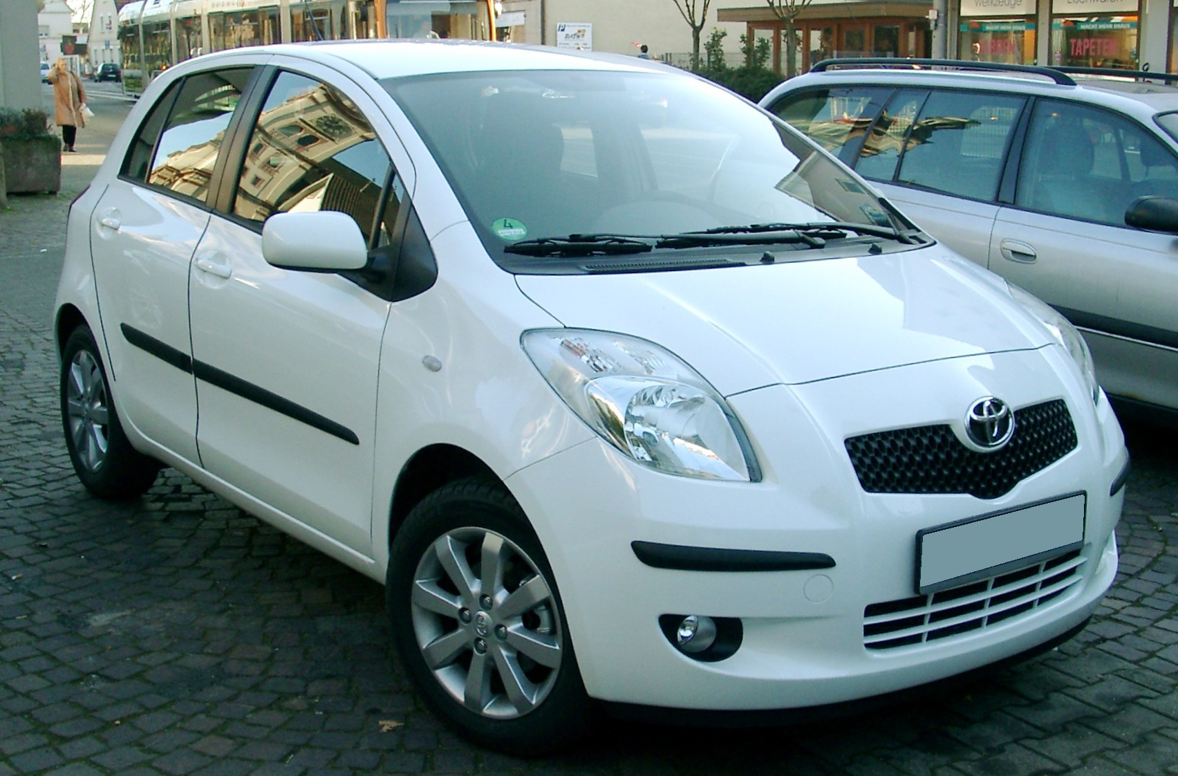 Toyota Yaris